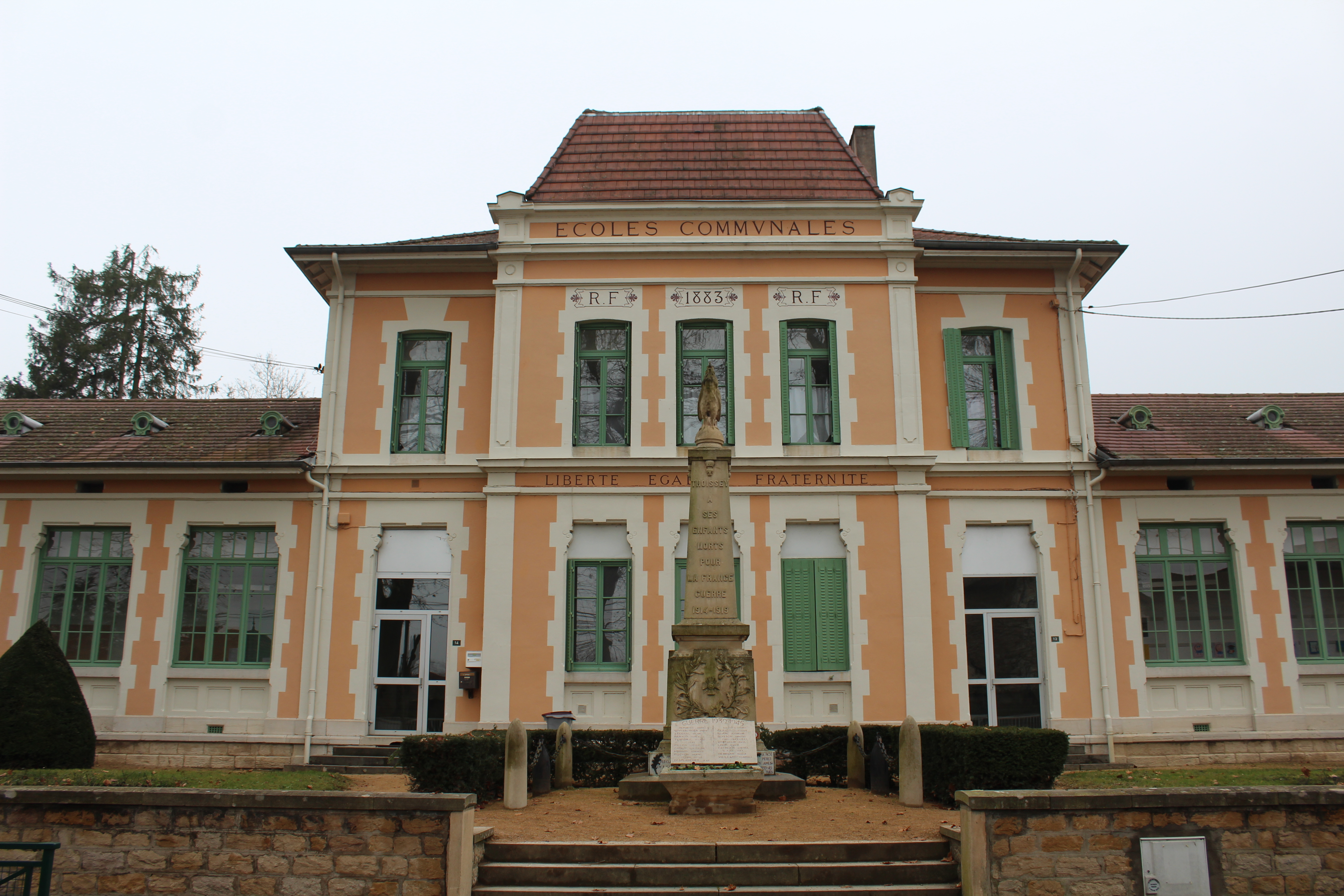 École élémentaire de Thoissey.